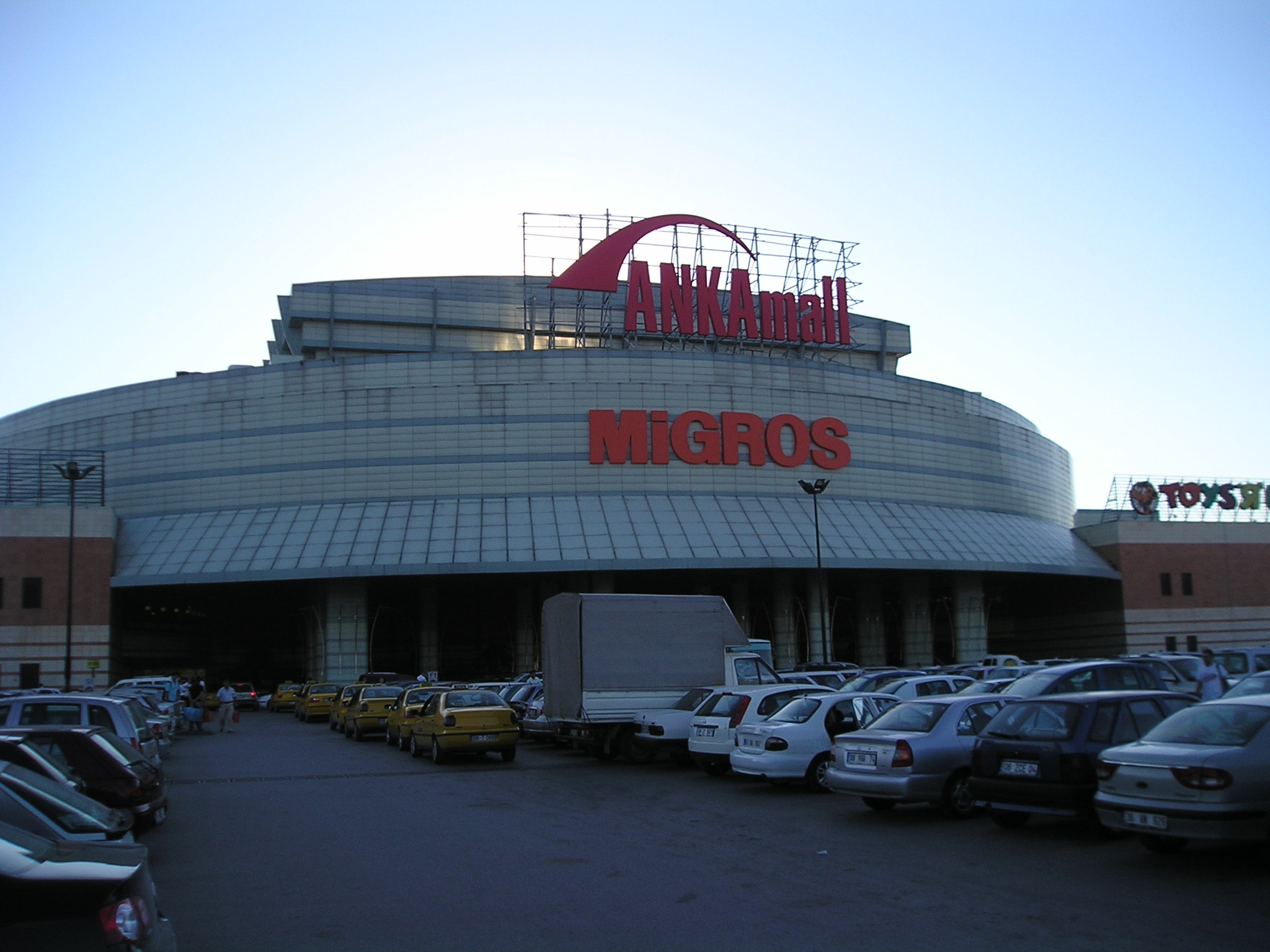 Description Foto van winkelcentrum ANKAmall te Ankara, Turkije. DateJuly 2006SourceOwn workAuthorScisaPermission (Reusing this file) Vrij voor gebruik Foto van winkelcentrum ANKAmall te Ankara, Turkije.